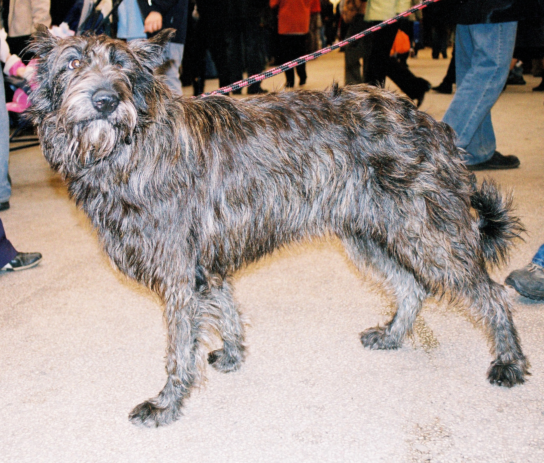 autor: Pleple2000 11:26, 5 April 2006 (UTC)